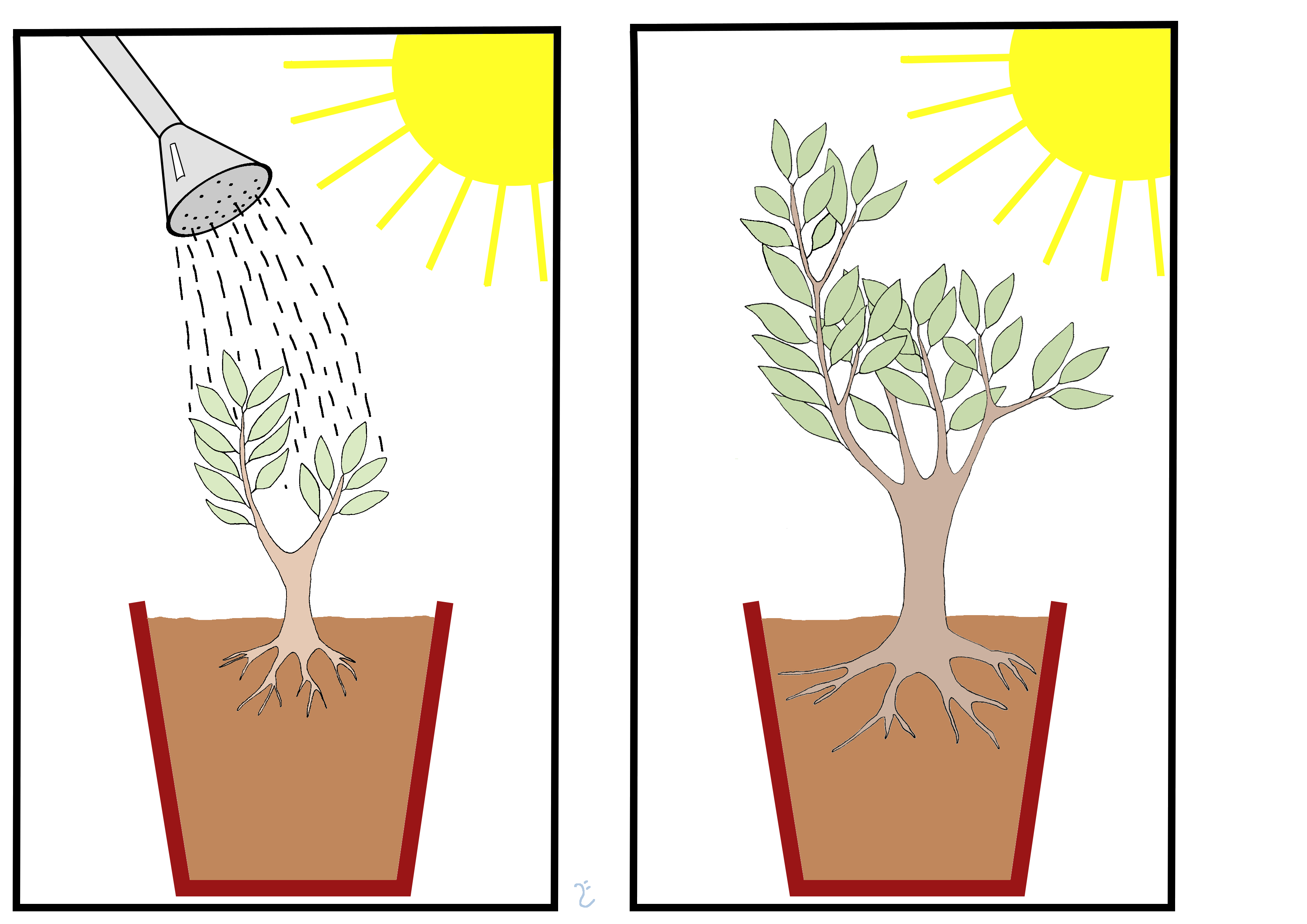 Woher bezieht eine Pflanze ihre Stoffe zum wachsen.